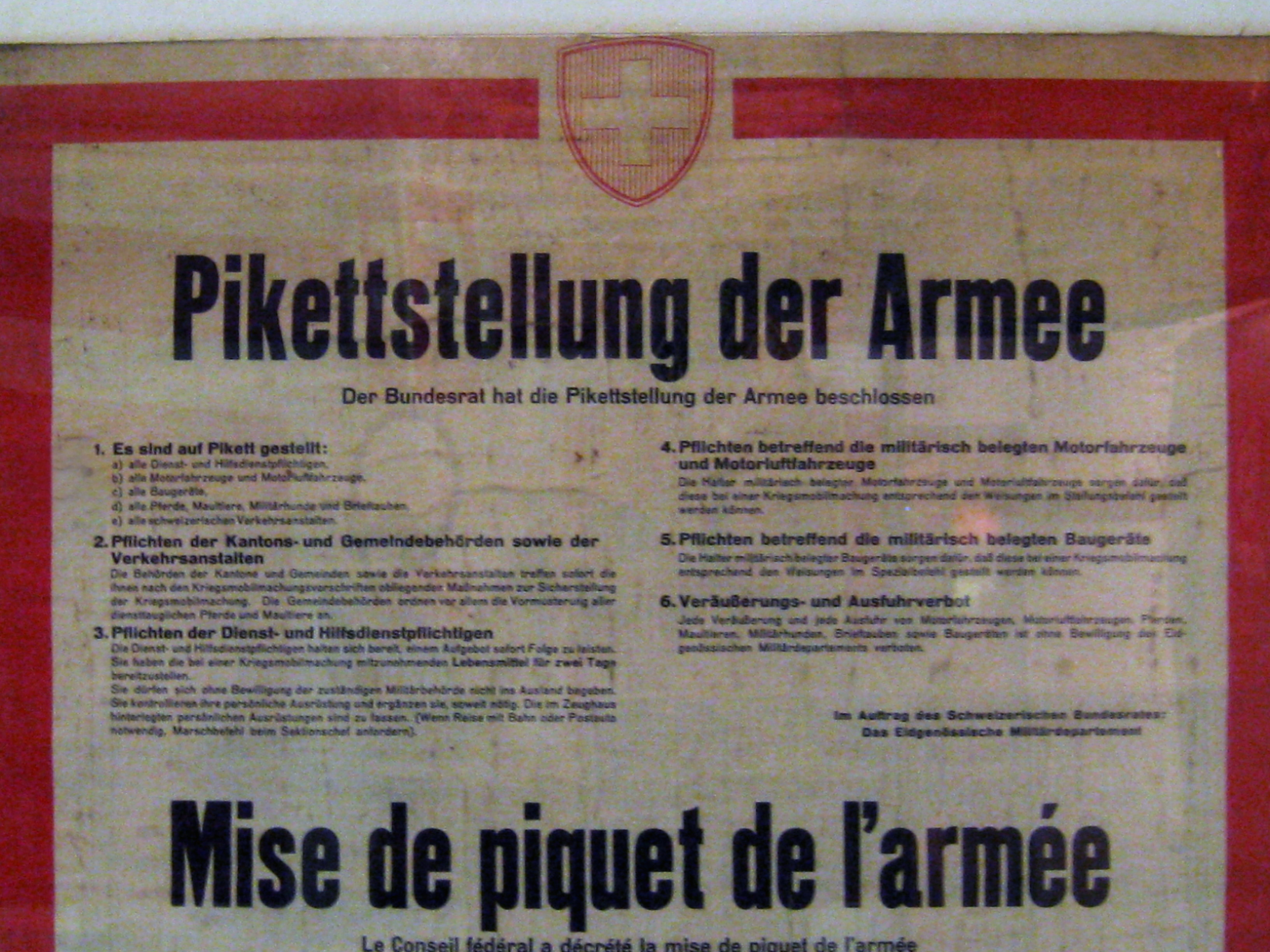 Pikettstellung der Schweizer Armee vor der Mobilmachung 1939, Plakat im Festungsmuseum Reuenthal